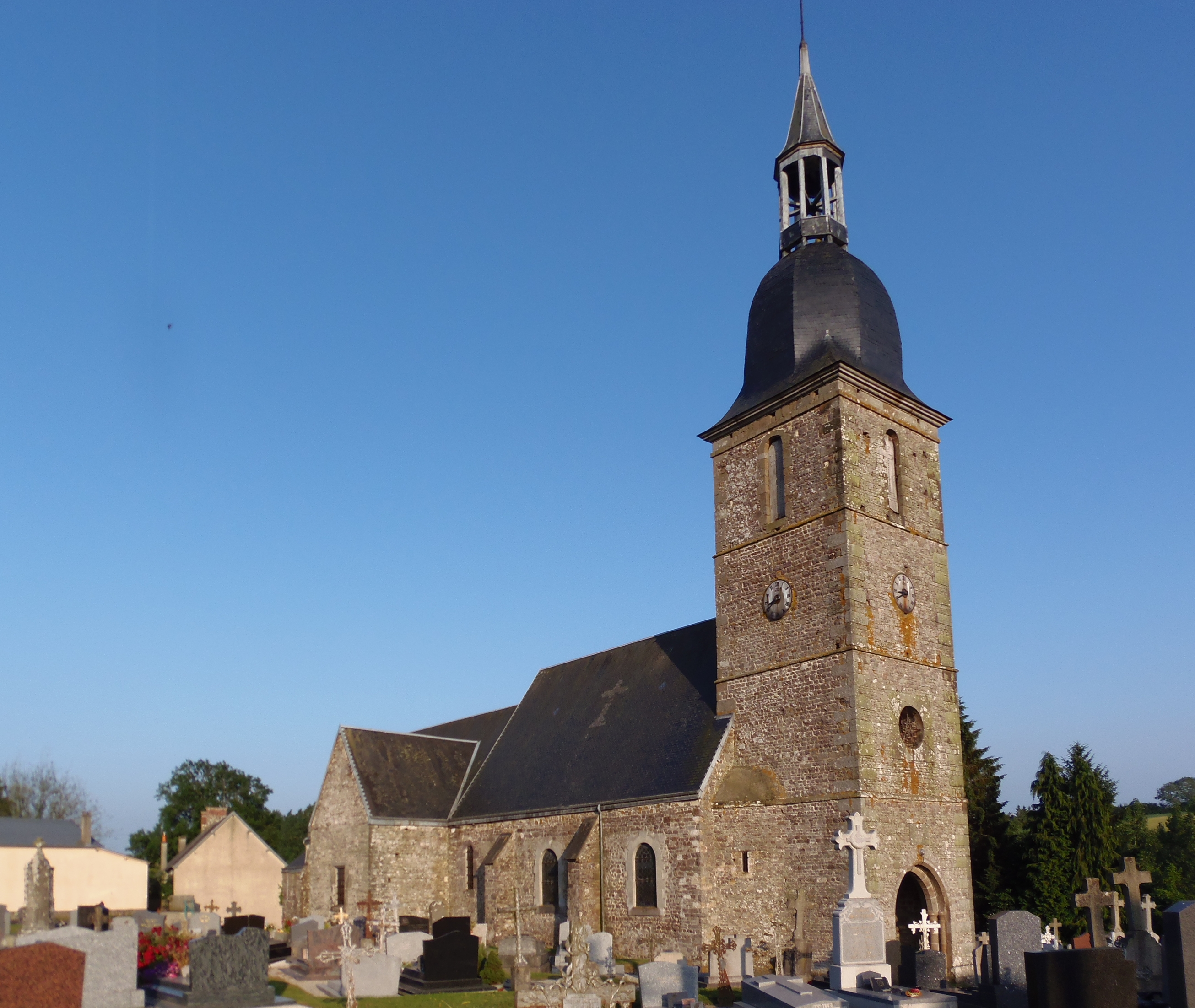 Lassy (Normandie, France). L'église Saint-Rémy.